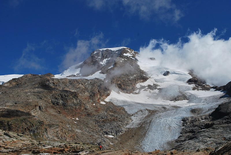 Piramide Vincent 4.215 m s.l.m. è una montagna del massiccio del monte Rosa nelle Alpi Pennine.Sulla sinistra si intravedono i rifugi Mantova e Nifletti, il ghiacciaio è il ghiacciaio del Lys Foto presa dal sentiero che sale verso cima Alta Luce(HOCHLICHT) nella Valle del Lys. Gressoney